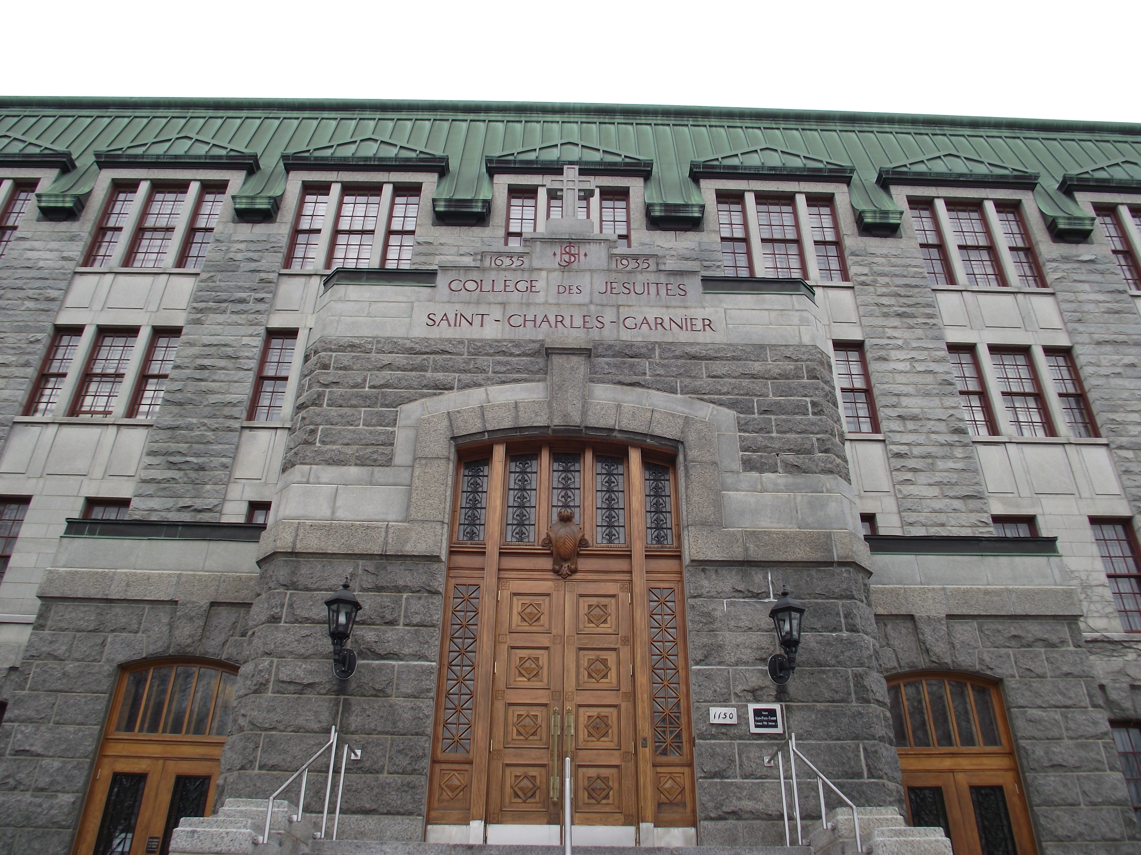 Façade du Collège Saint-Charles-Garnier